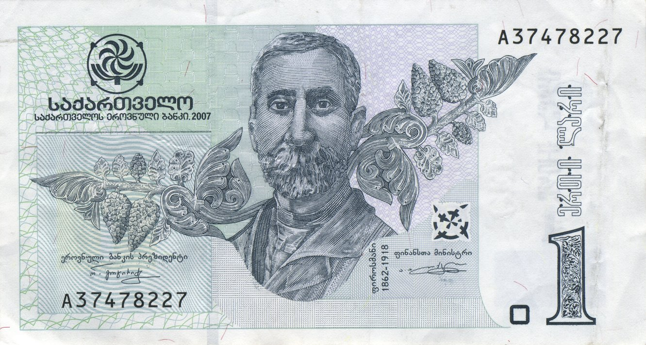 1 Georgian lari